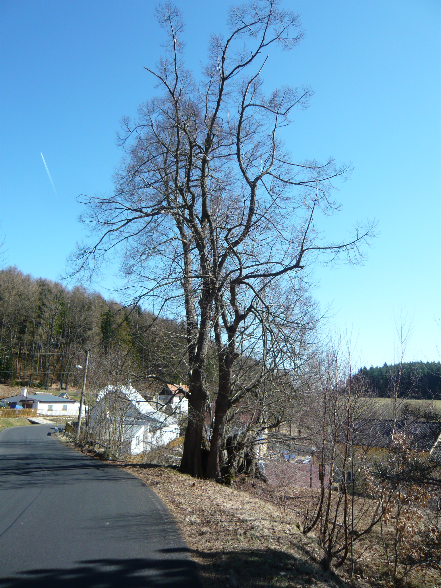 Tatrovická lípa